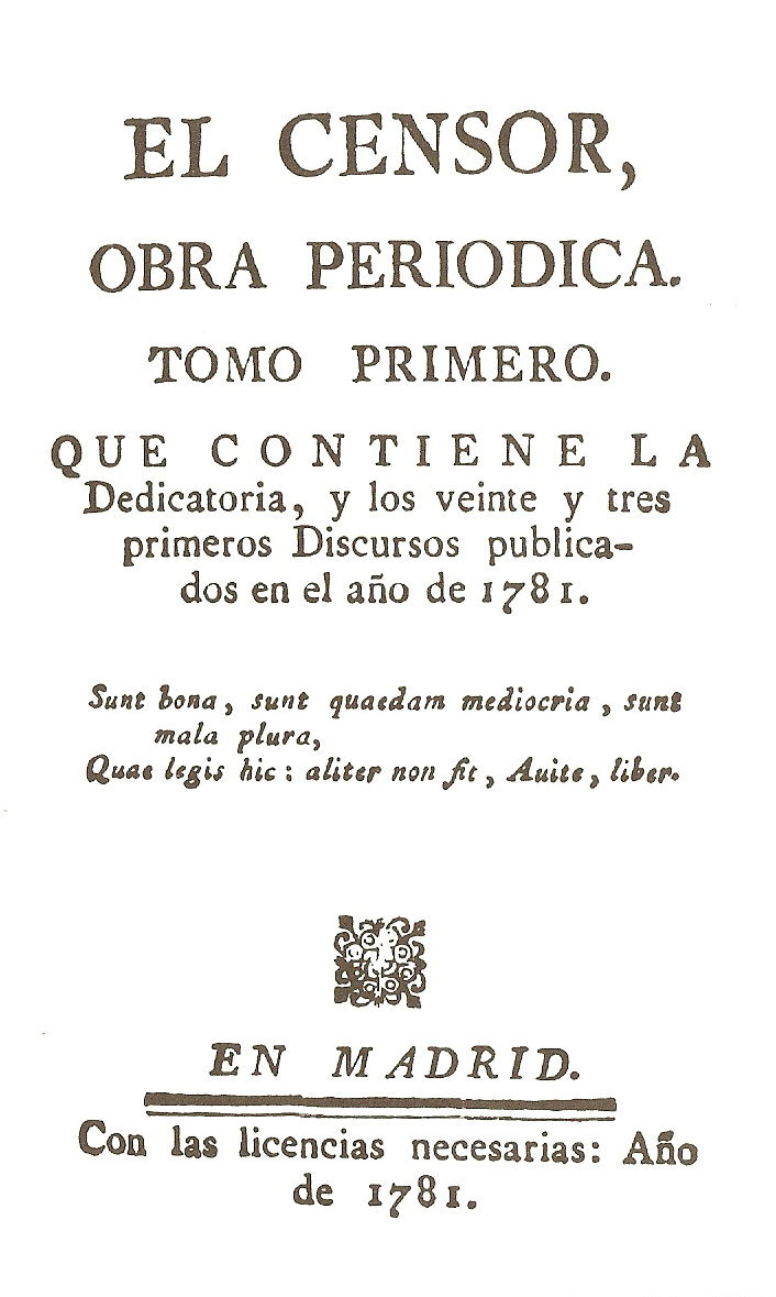 Portada del volumen que recoge los discursos de este periódico del siglo XVIII